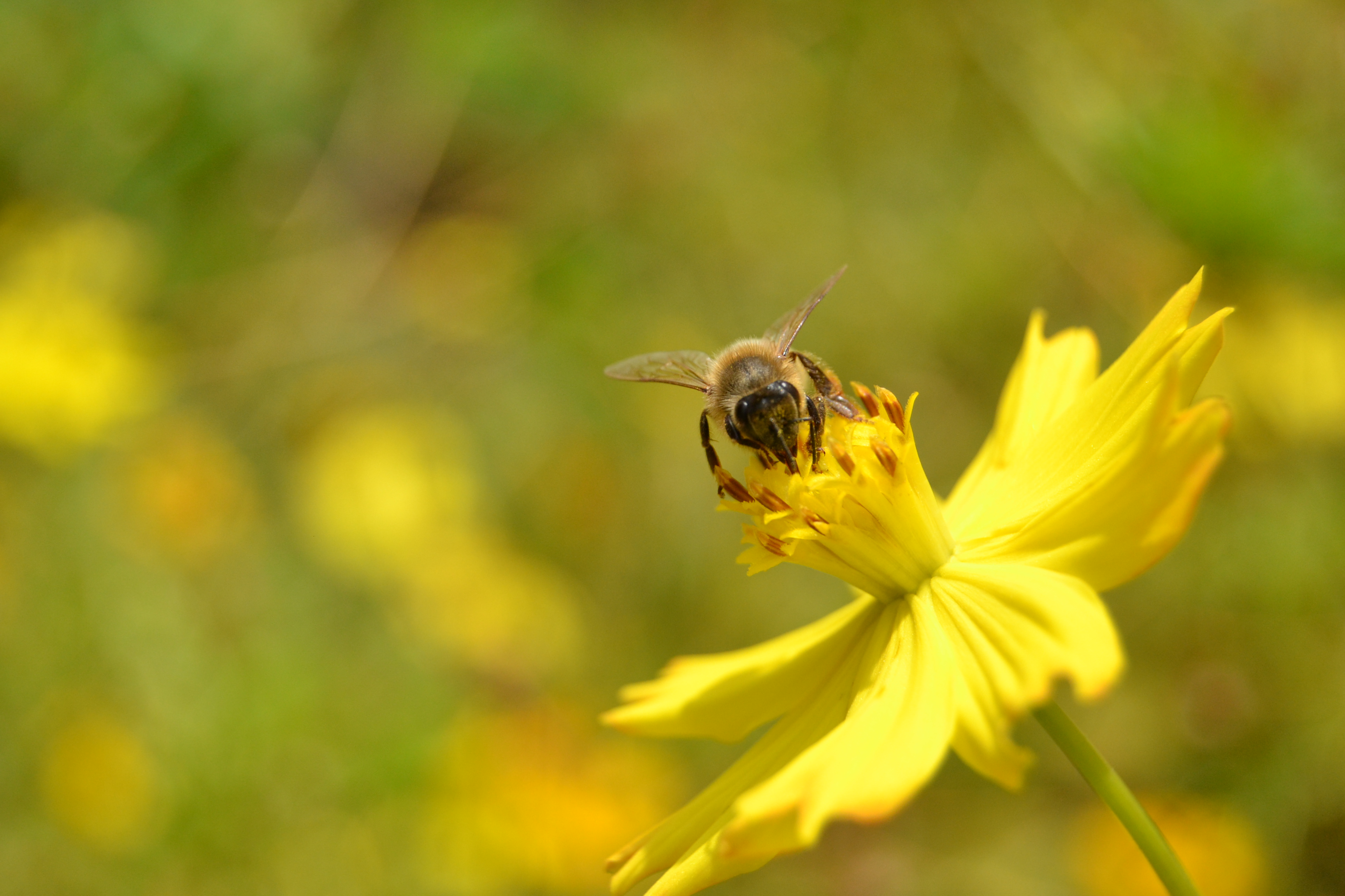 La pollinisation des abeilles.